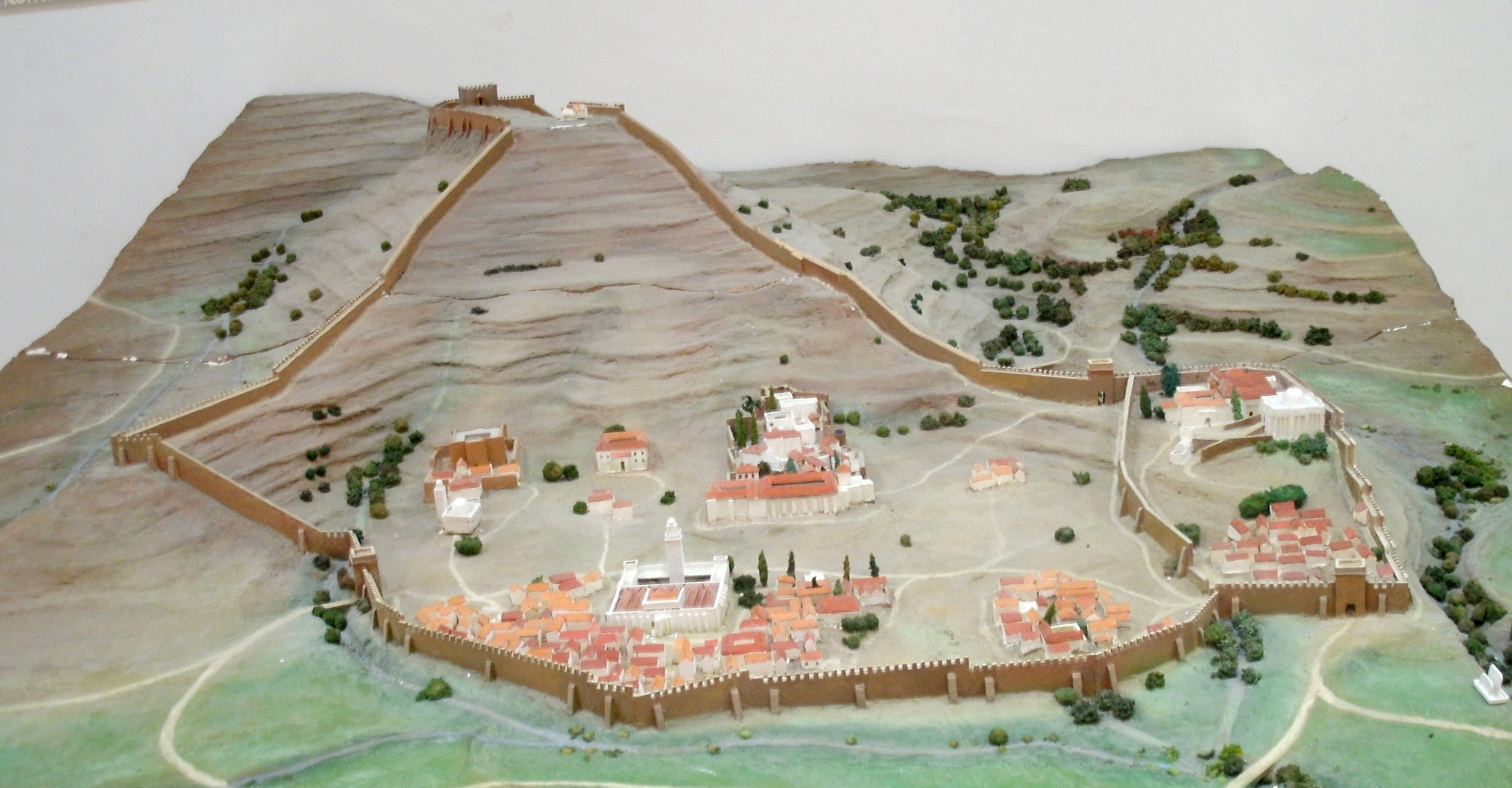 Maquette de la Kalâa des Béni Hammad